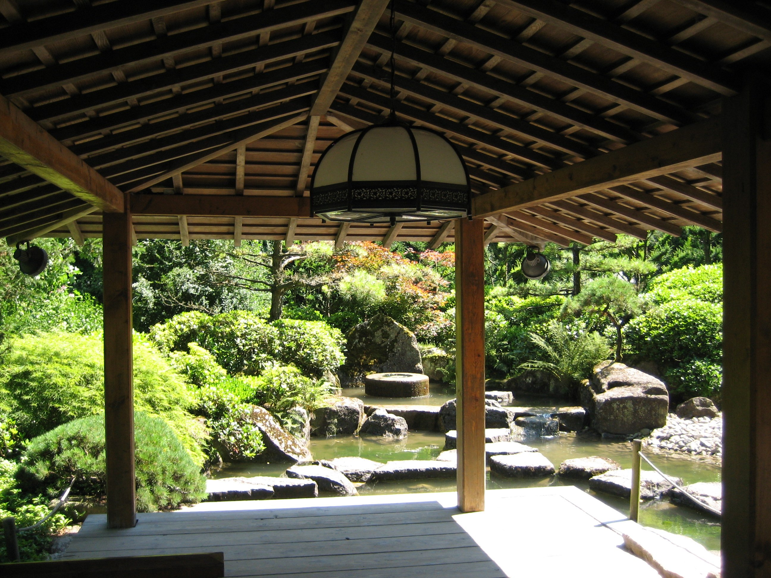 Botanischer Garten in Augsburg, Blick aus dem Pavillon im Japangarten